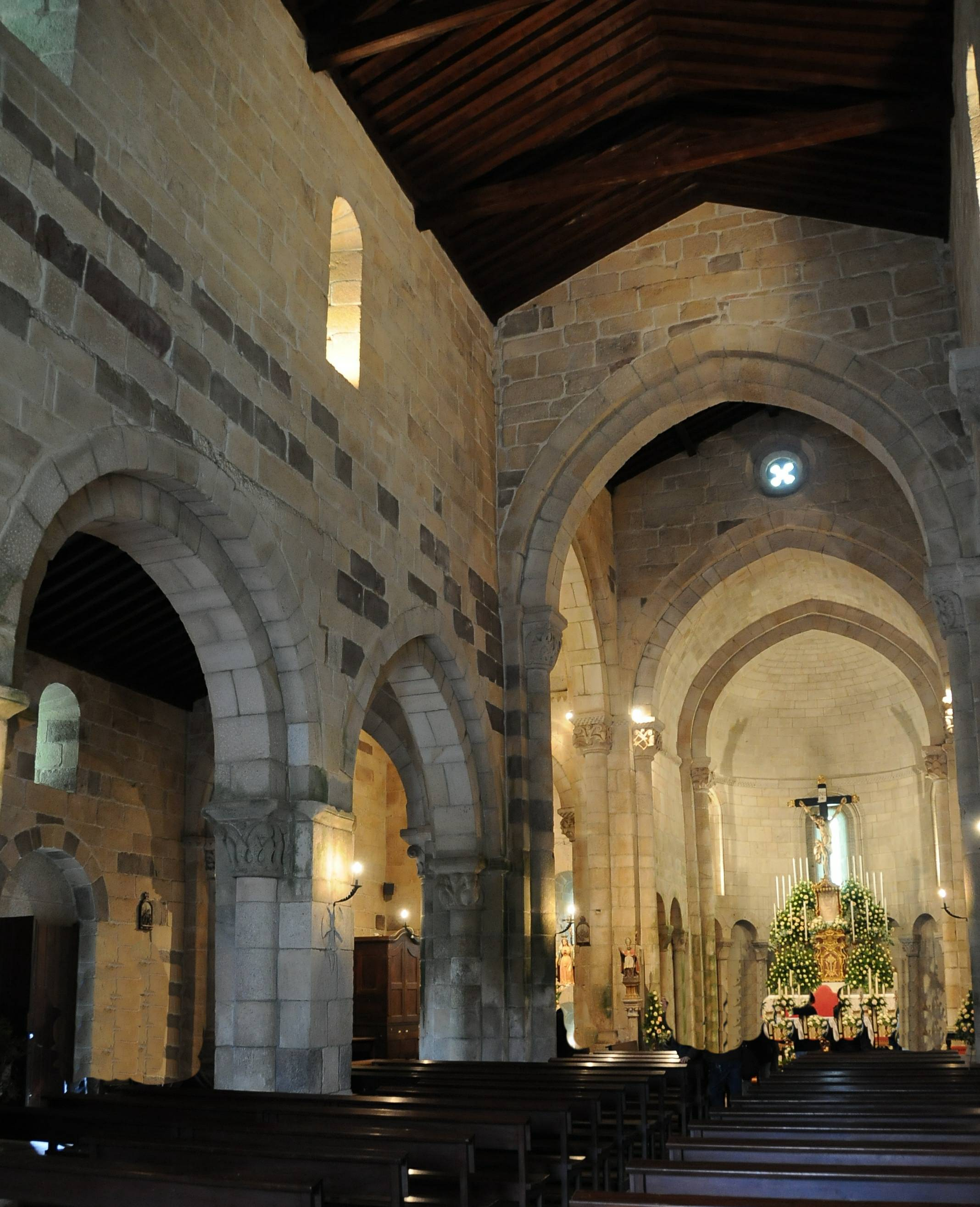 São Pedro de Rates Church, in Rates, Povoa de Varzim, Portugal